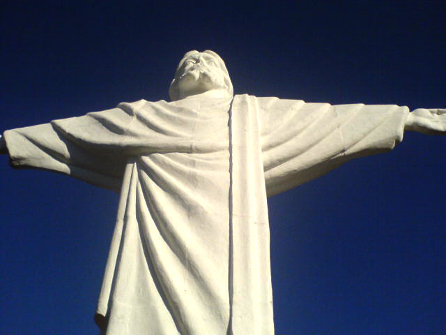 Cristo redentor de Águas de Lindóia - São Paulo - Brasil